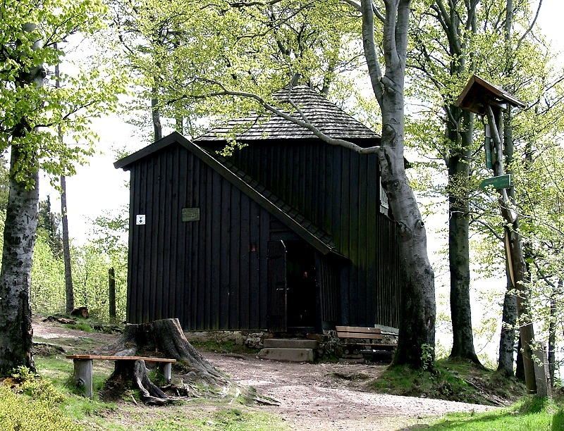 Das Bild zeigt das Goethehäuschen auf dem Kickelhahn bei Ilmenau